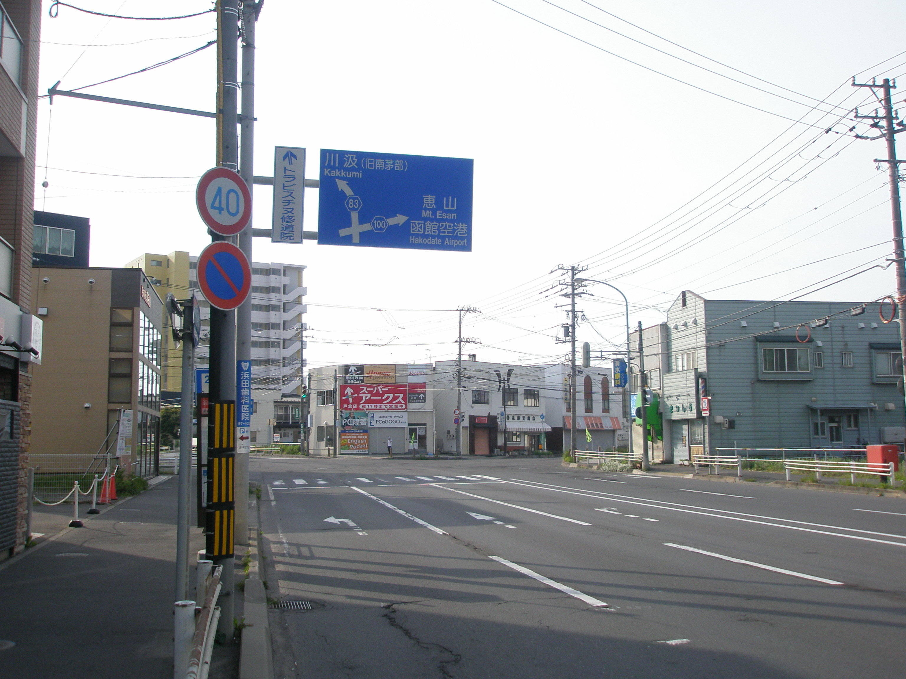 北海道道83号函館南茅部線・北海道道100号函館上磯線交点（起点側・函館上磯線起点側から）